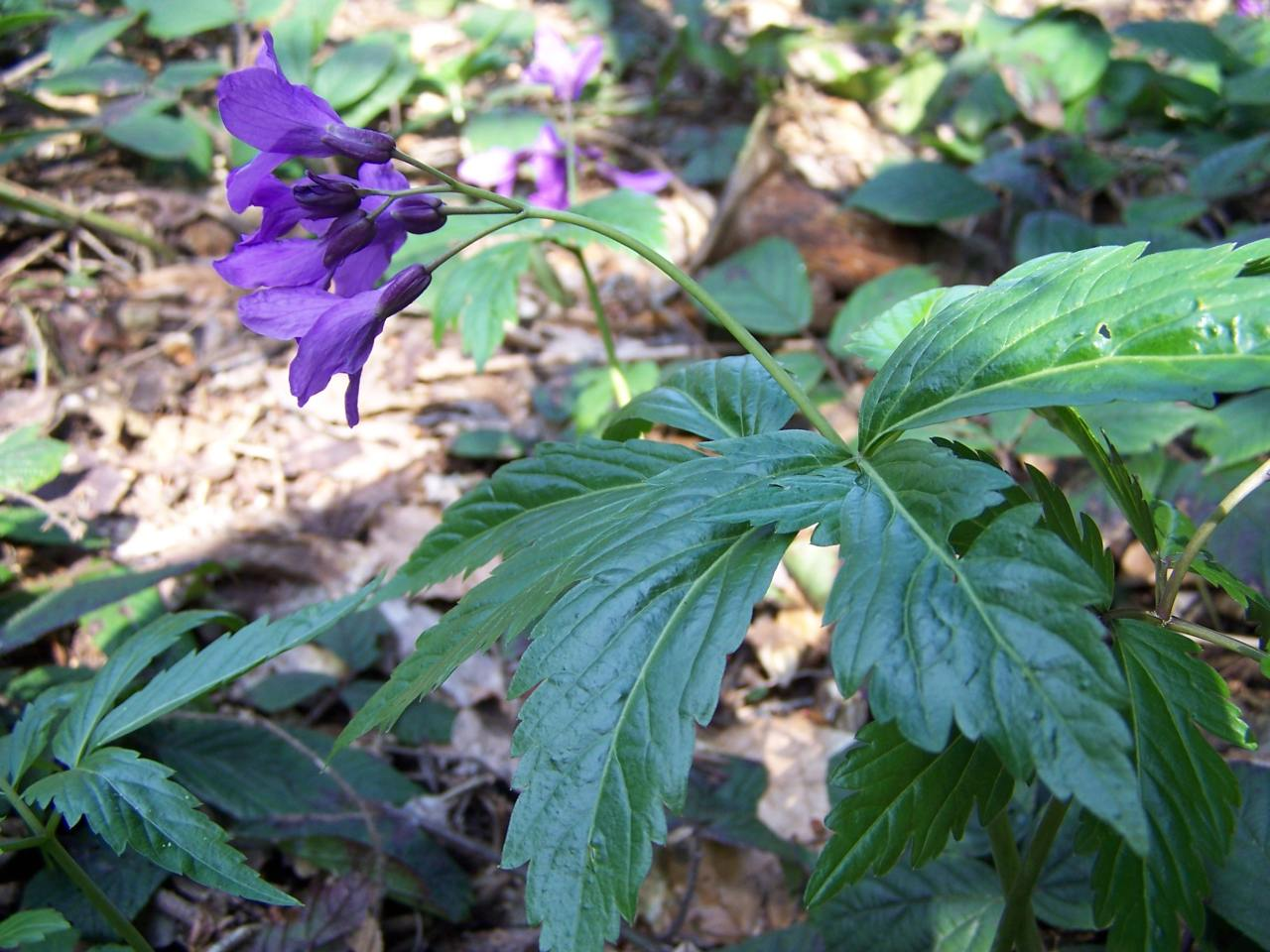 Cardamine glandulosa (pl. żywiec gruczołowaty)